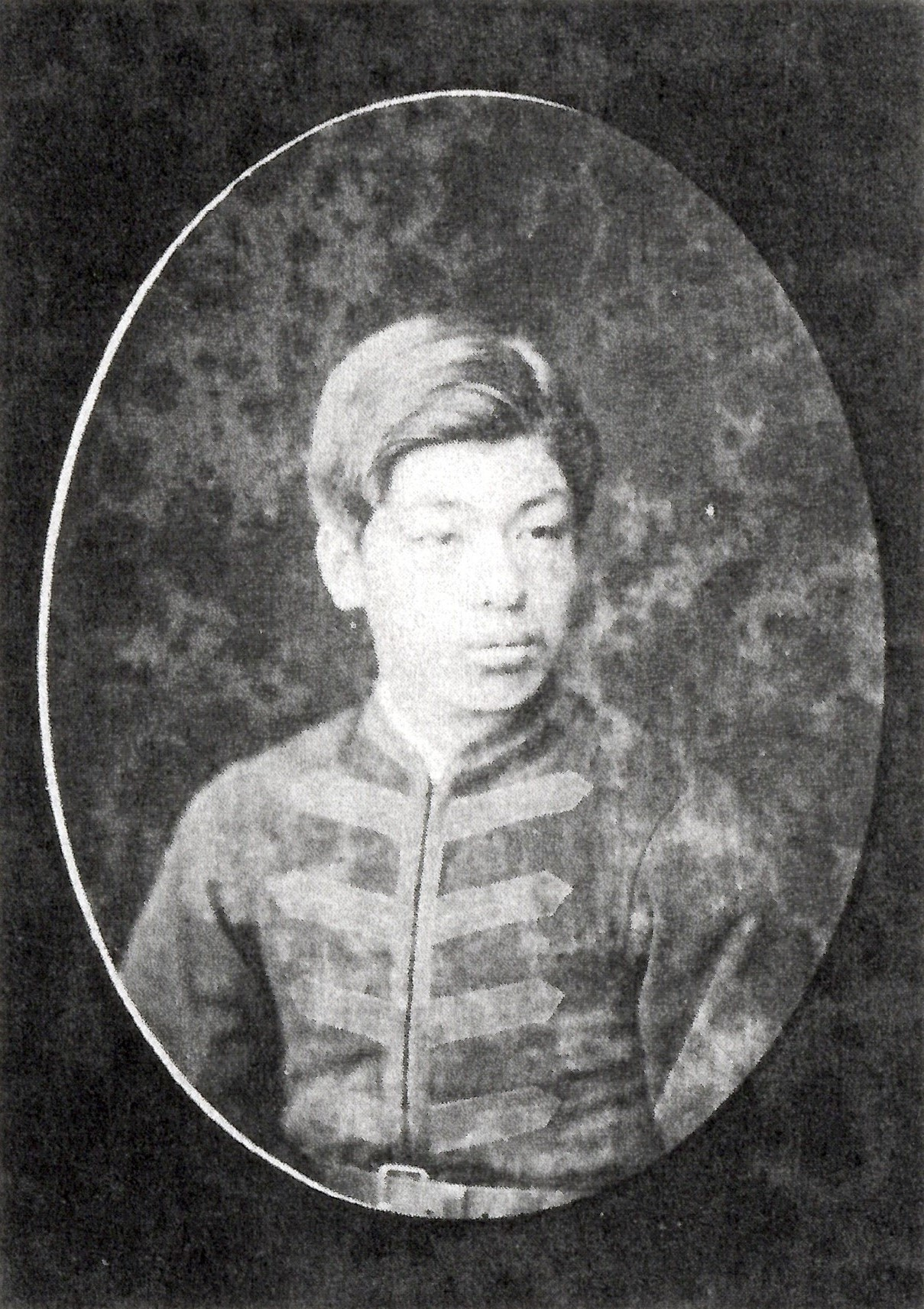 山名義路の肖像写真。